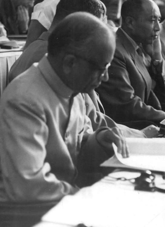 Zentralbild Heilig 12.7.1958. V. Parteitag der SED vom 10. bis 16.7.1958 in der Werner-Seelenbinder-Halle, Berlin, 3. Tag: UBz: Das Mitglied des Sekretariats der Kommunistischen Partei Indiens, Dange, im Präsidium.